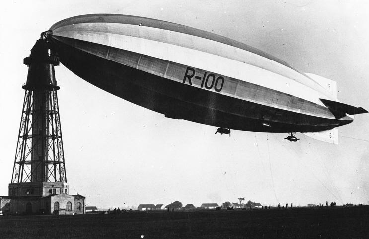 Le dirigeable R-100 lors d'une escale à St-Hubert (Québec, Canada)